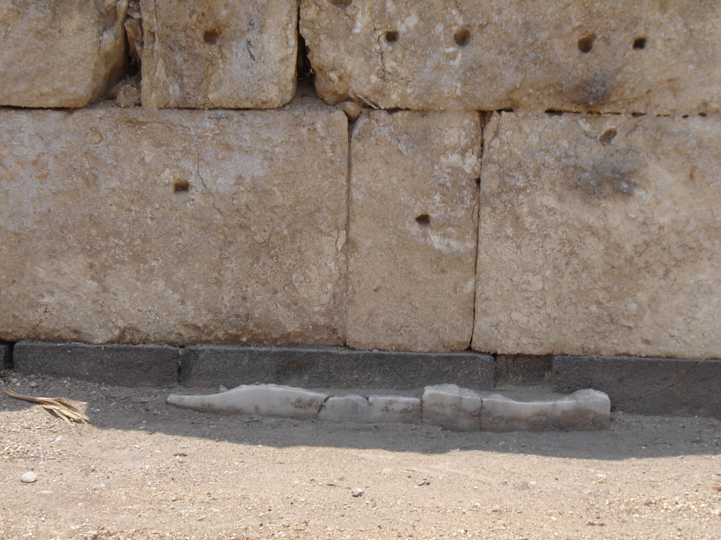 Sockelverkleidung; Khirbet al-Minya /Israel